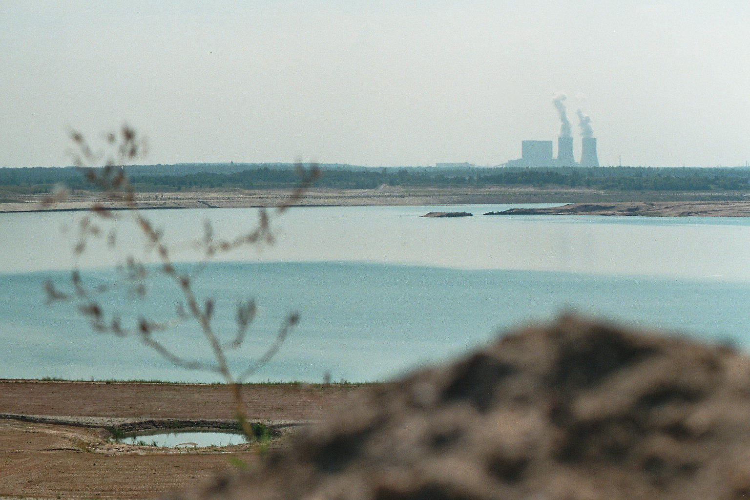 Störmthaler See bei Leipzig, Flutungsstand August 2007, im Hintergrund das Kraftwerk Lippendorf